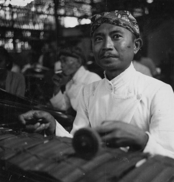 Negatief. Man die de gendér barung bespeelt in een gamelanorkest